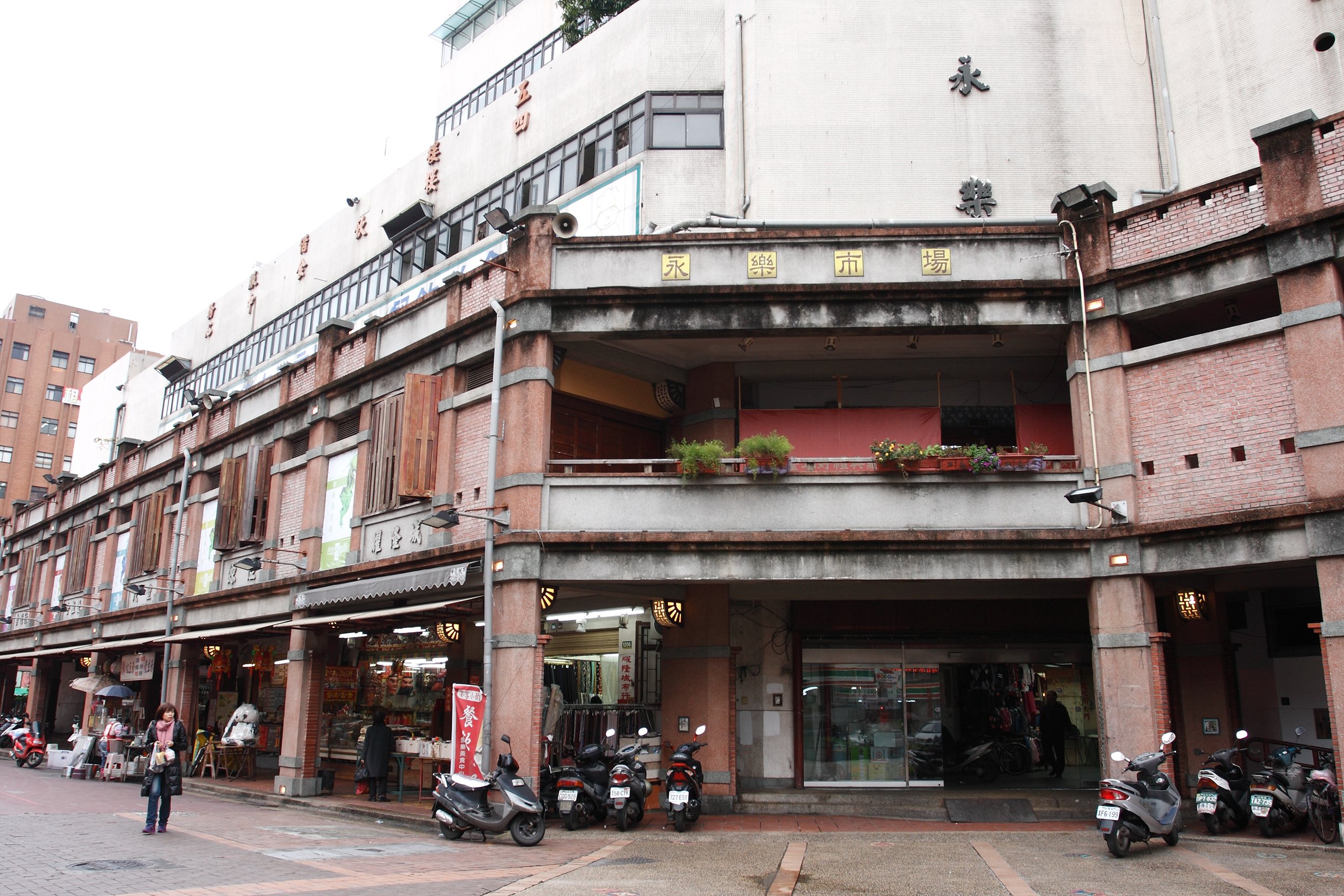 中文（台灣）: 臺北市永樂市場西側配合迪化街街景，保留傳統紅磚建築的立面。